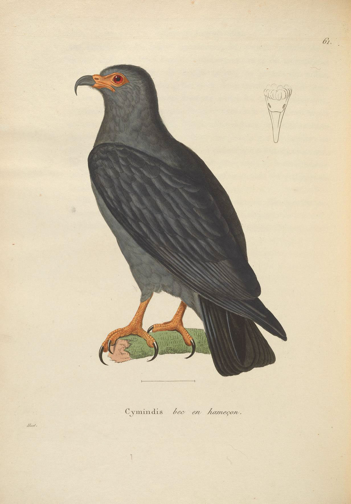 6\ I. Cj^miiidis Se.y ôtv Aanzeço/v j/i^^^.